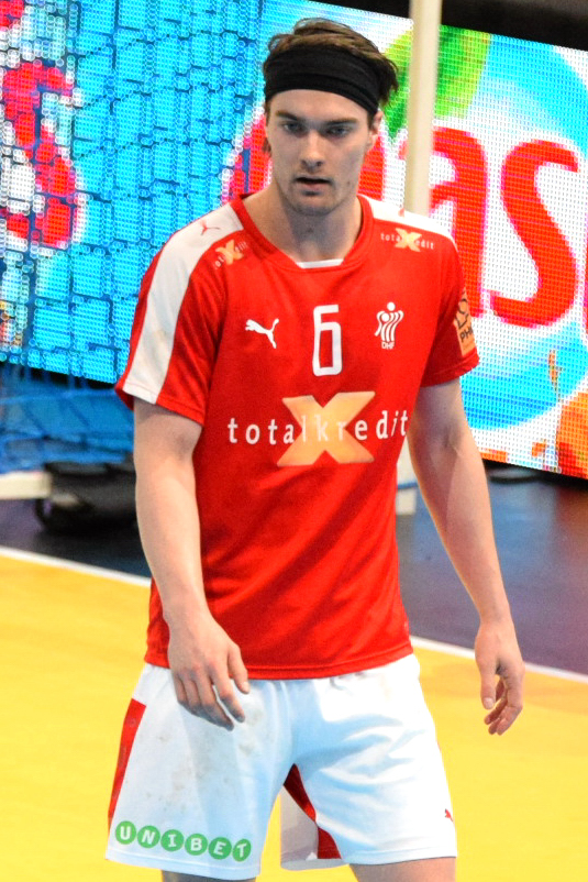 Le 10 janvier 2016 lors du match France / Danemark durant la Golden League à l'AccorHotels Arena (Paris).